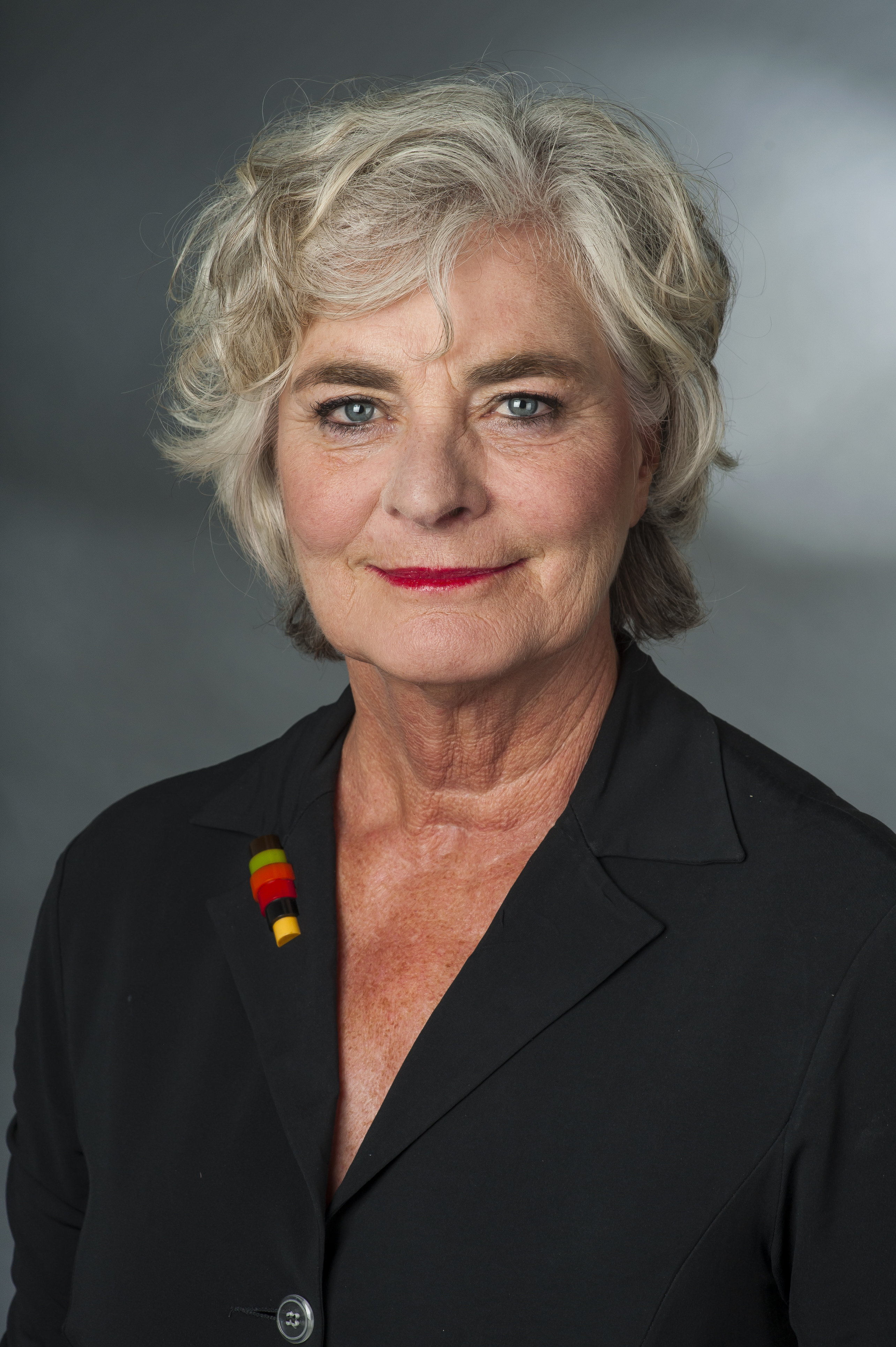 Petra Crone (* 3. Juli 1950 in Lüdenscheid) ist eine deutsche Politikerin (SPD) aus Kierspe, Nordrhein-Westfalen. Sie ist seit der Bundestagswahl 2009 Mitglied des Deutschen Bundestages.